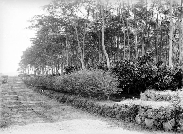 Negatief. Cacao aanplant onder Deguelia met rorako pagger (ormocarpum glabrum)